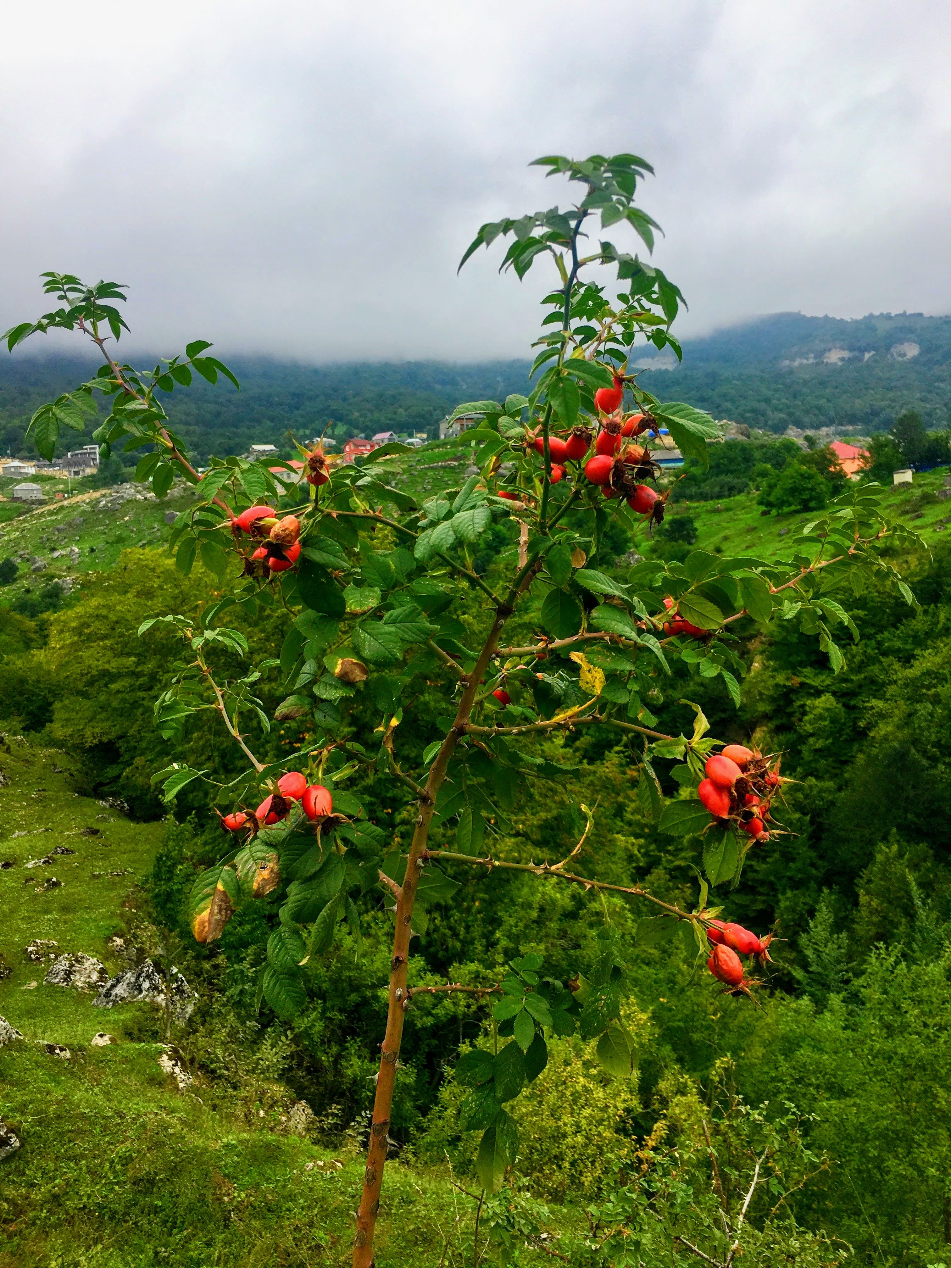 Azərbaycanın Quba rayonu Qırız Dəhnə kəndində həmərsin kolu.